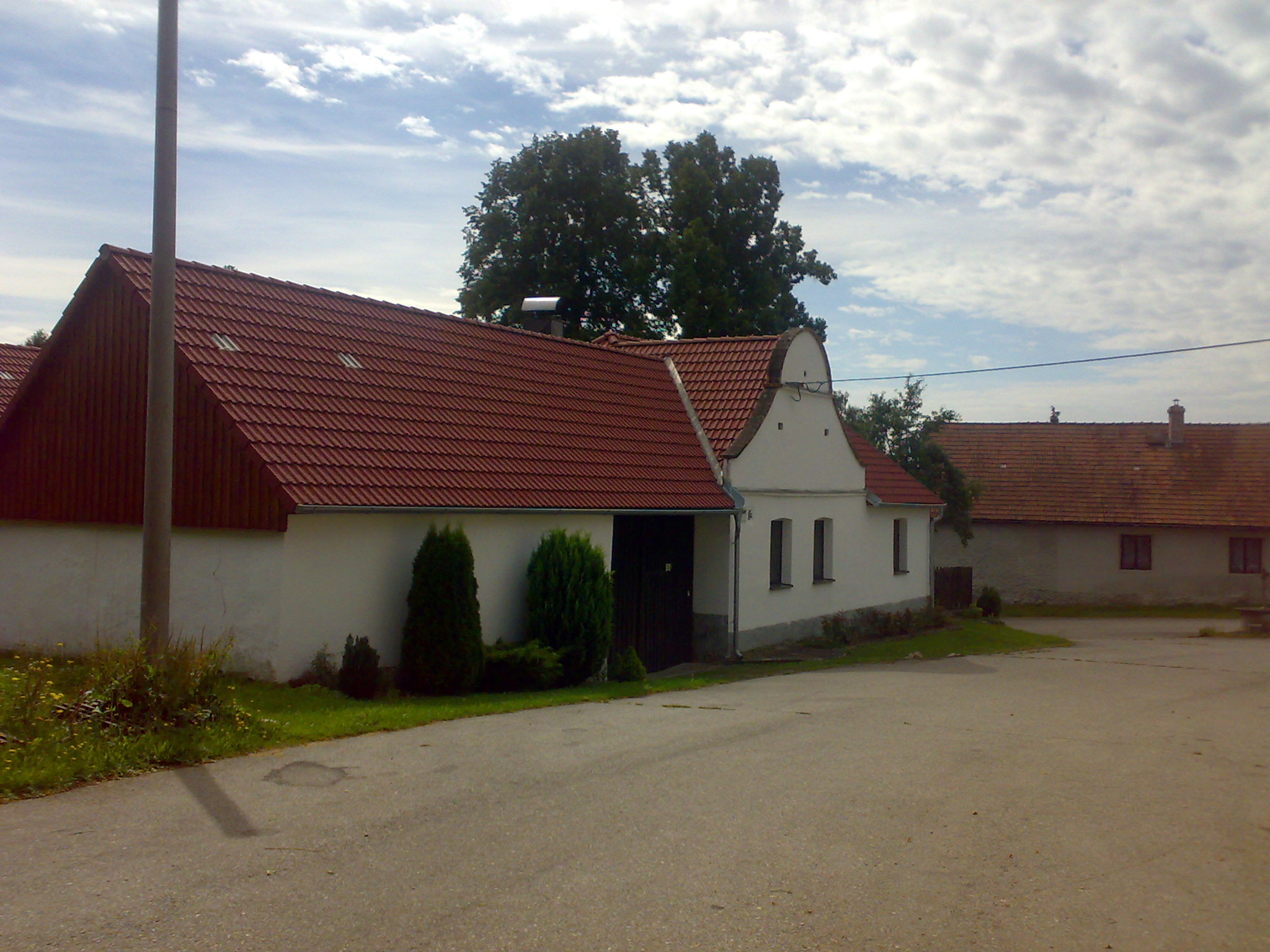 Čepřovice, statek na návsi